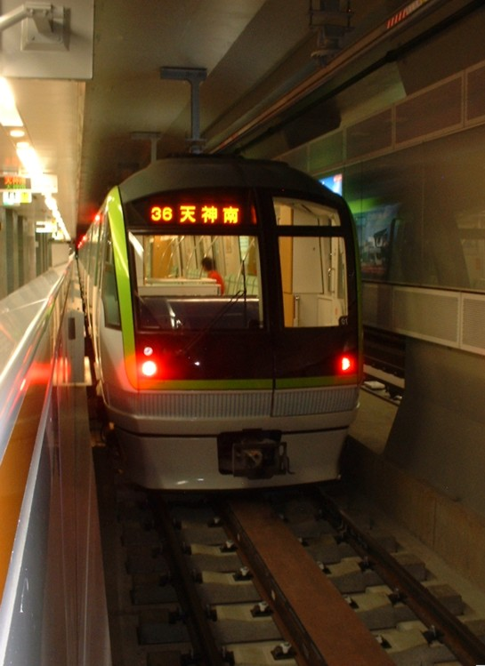 福岡市交通局3000系 七隈線橋本駅にて